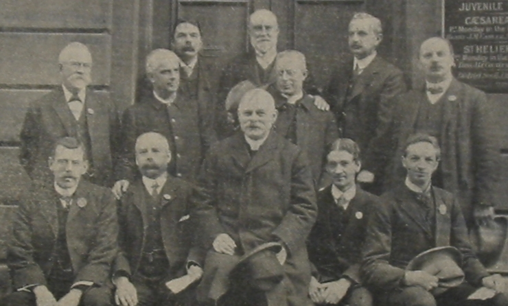 Nrf: D'la Vielle Chronique, Jèrri